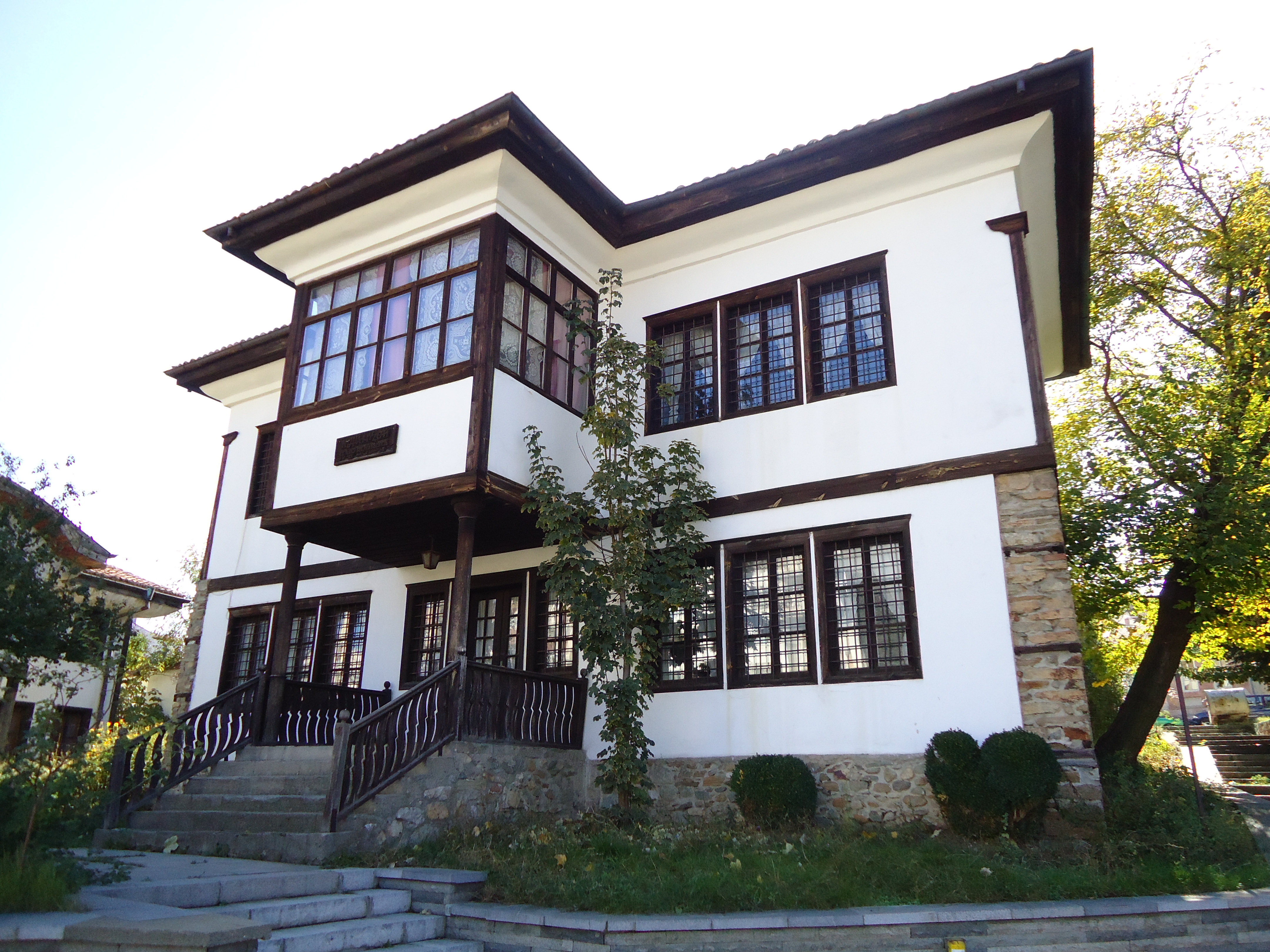 Къщата на Ильо войвода в гр.Кюстендил